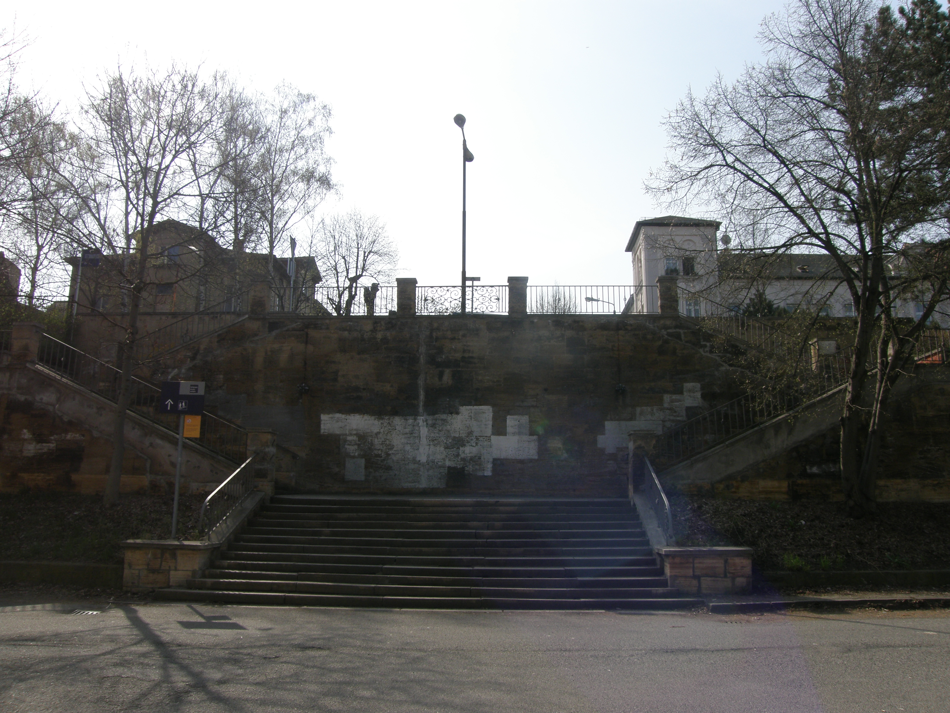 Stadt Apolda - Treppe gegenüber dem Bahnhof zur Rosestraße